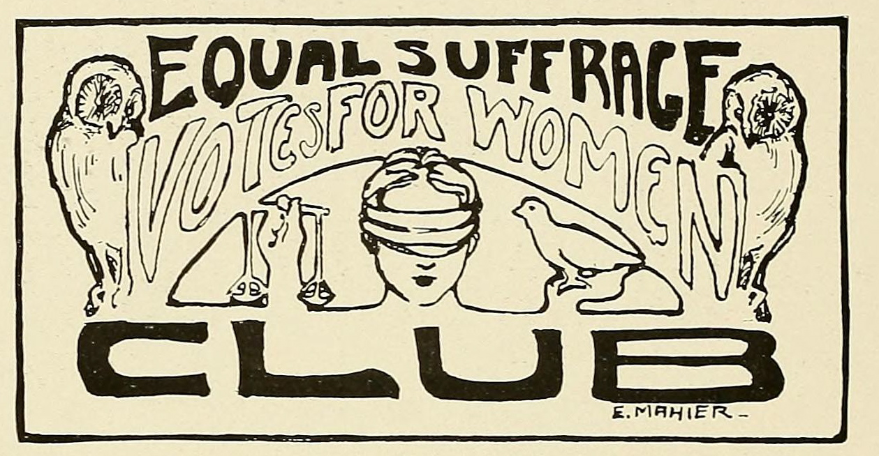 "Equal Suffrage - Votes For Women - Club"